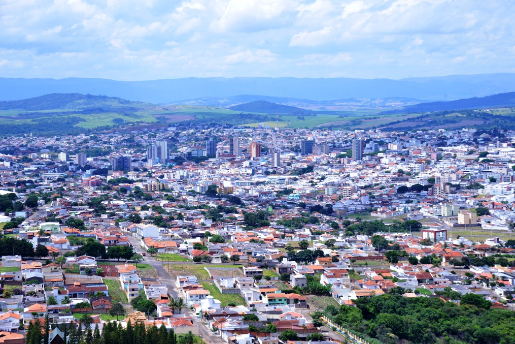 Vista aérea da cidade de Passos-MG